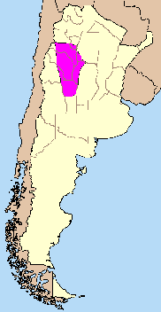 Ubicación de la región Imagen creada por Usuario discusión:LadyInGrey